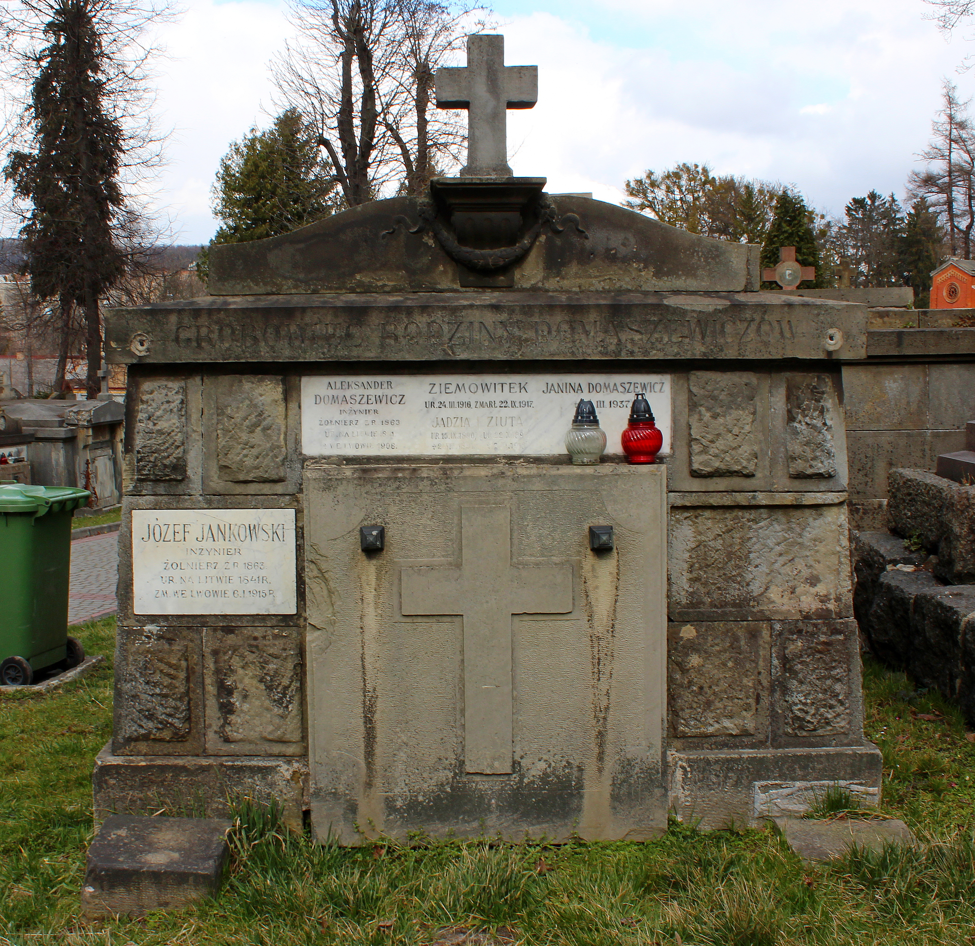 Гробівець родини Домашевичів.Личаківський цвинтар , поле № 68.